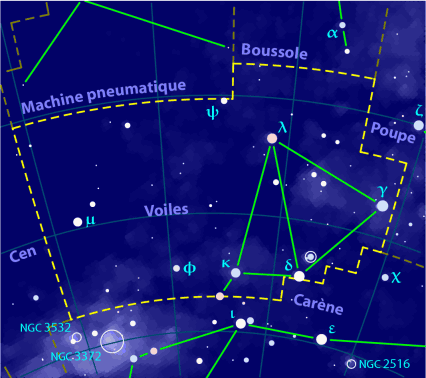 Carte pour la constellation des Voiles Produite à l'aide du logiciel PP3